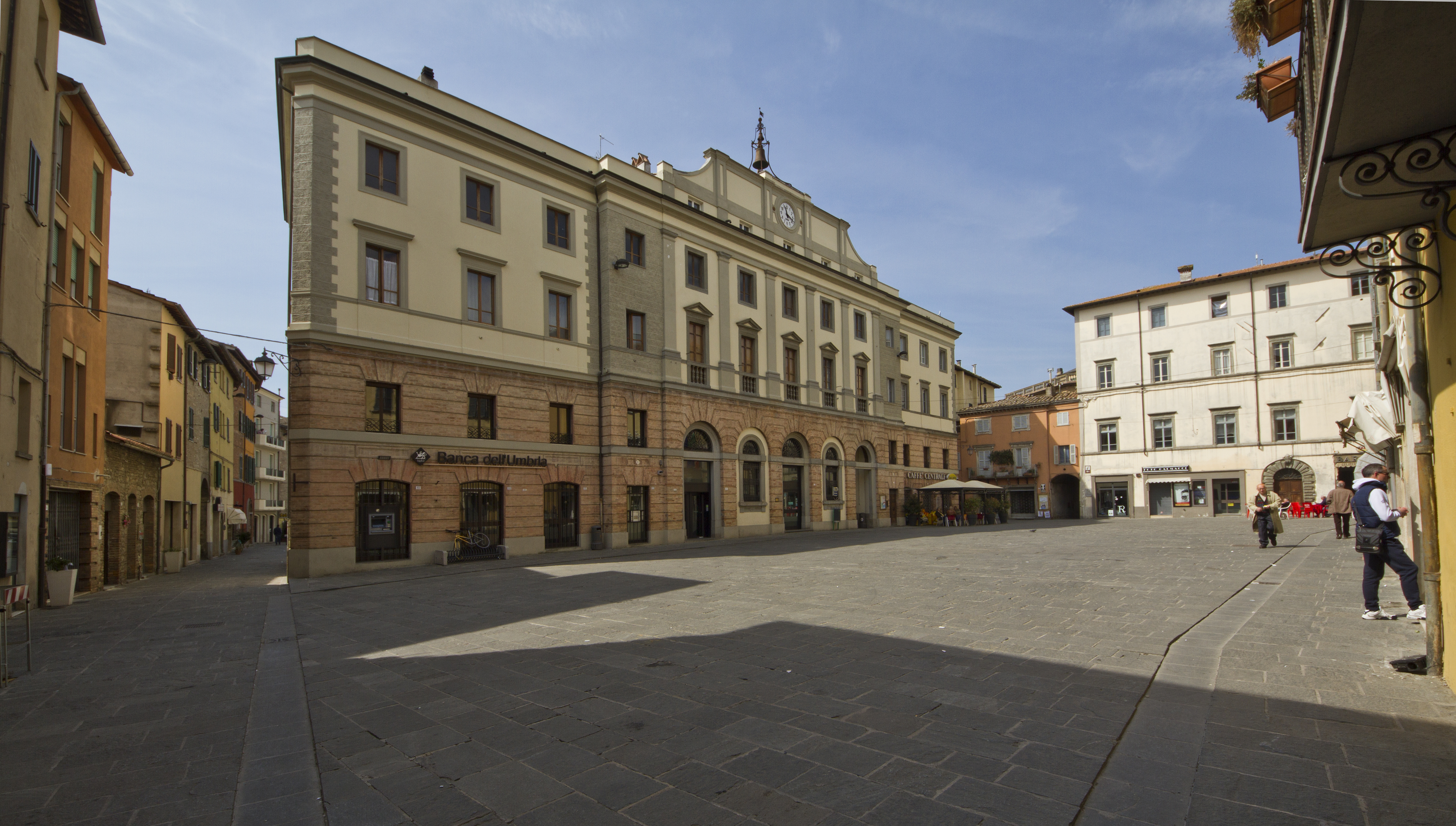 Piazza Giacomo Matteotti, Umbertide PG, Umbria, Italy